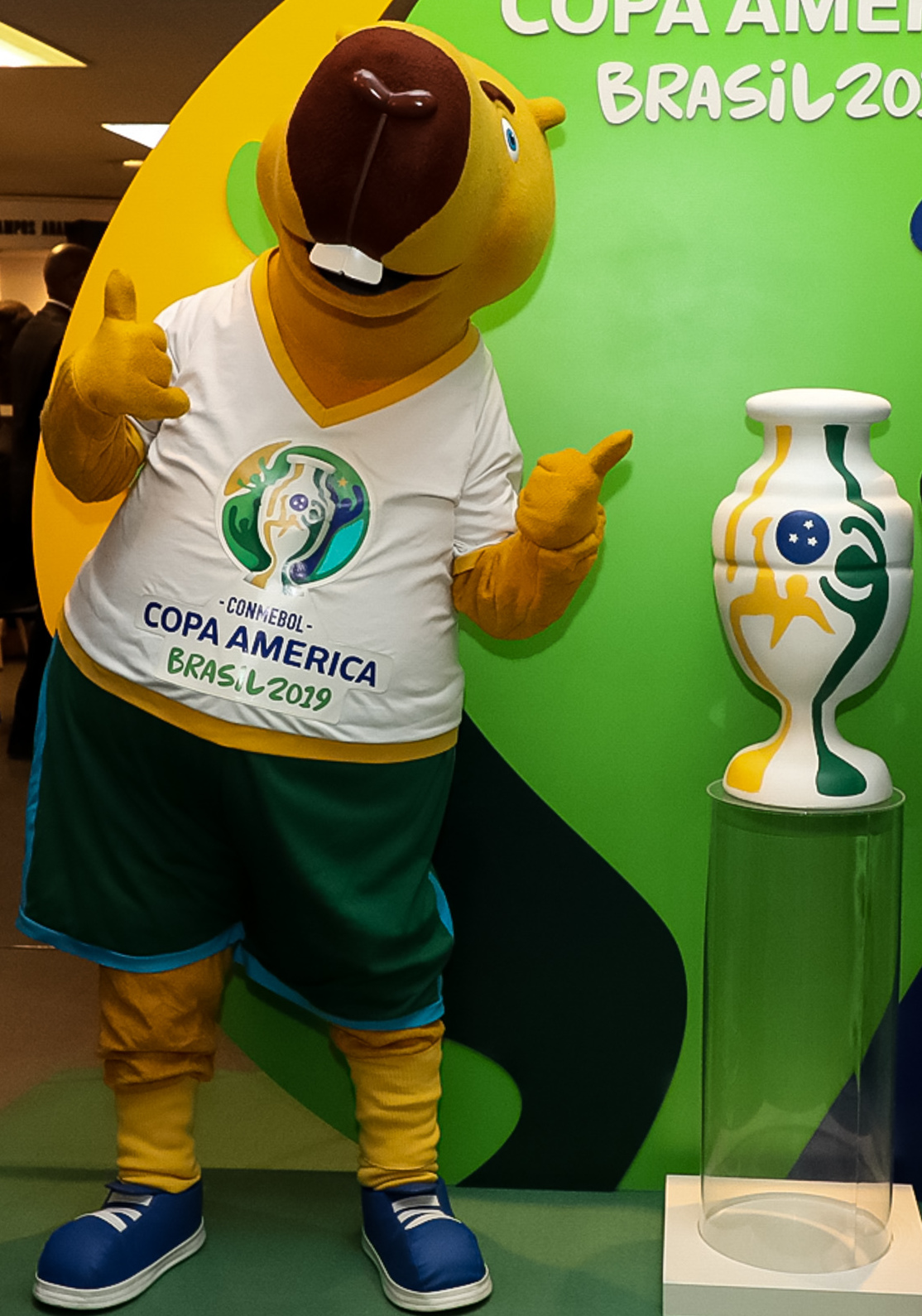 (São Paulo - SP, 14/06/2019) Presidente da República, Jair Bolsonaro e Zizito, mascote da Copa América. Foto: Marcos Corrêa/PR